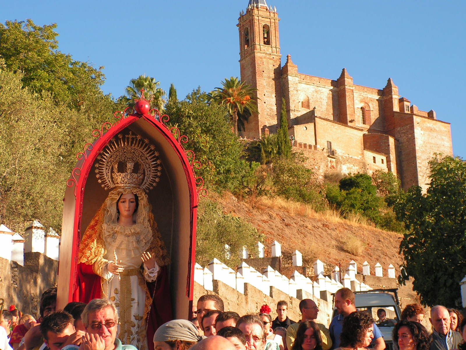 Imágen de los Zufreños llevando a hombros a su Virgen Ntra. Sra. del Puerto, a la salida de Zufre, Huelva, España